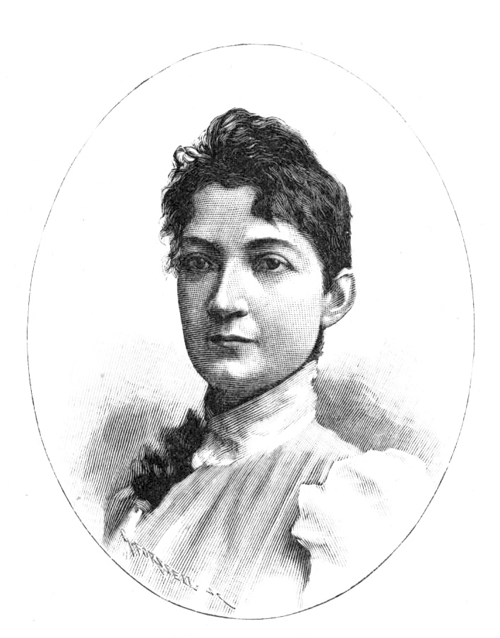 Ingeborg Westfelt-Eggertz (1855-1936)